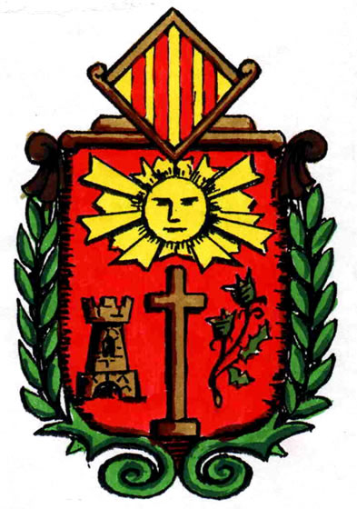 Escut de la ciutat de Solsona, actual emblema de l'Ajuntament.